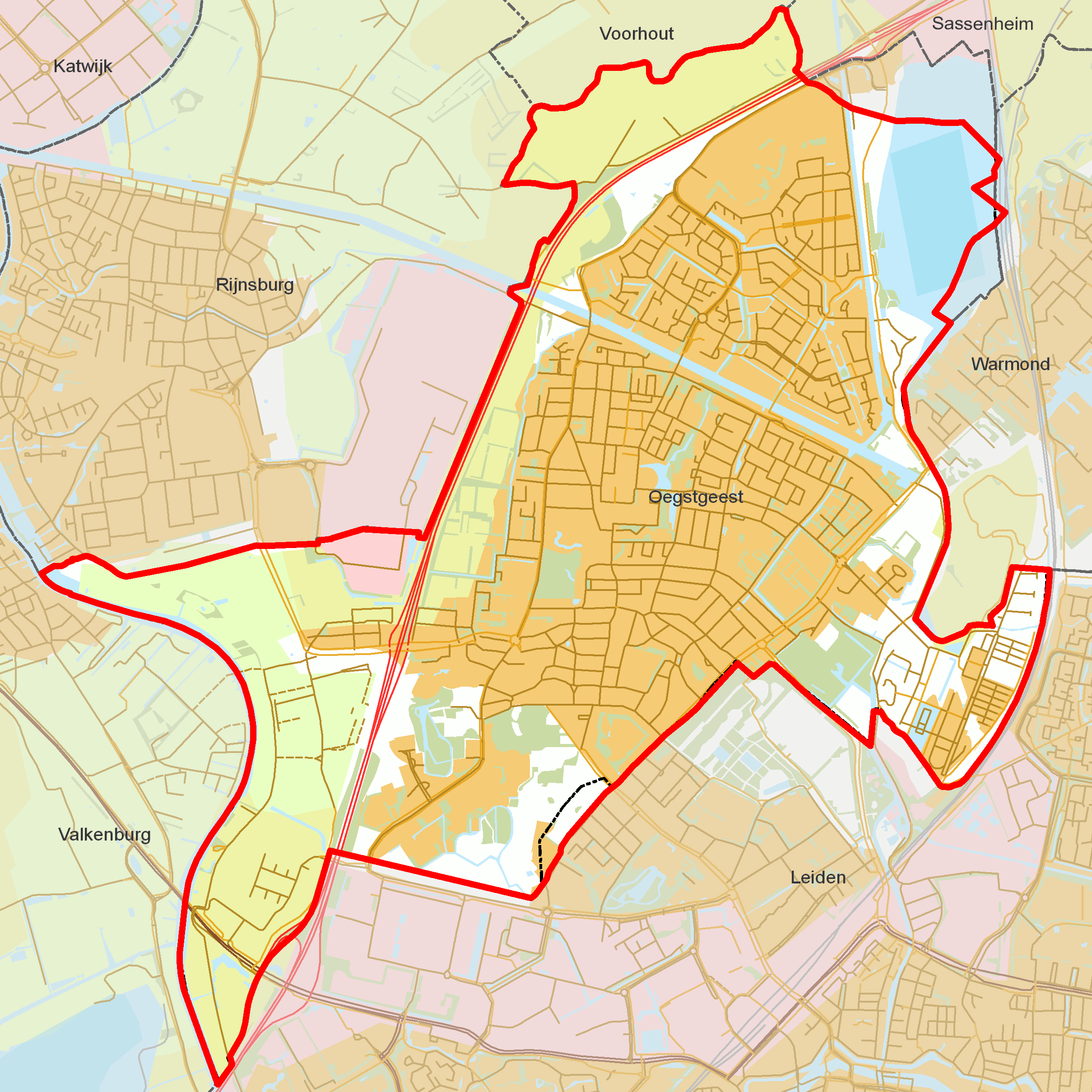 BAG woonplaatsen - Gemeente Oegstgeest.png